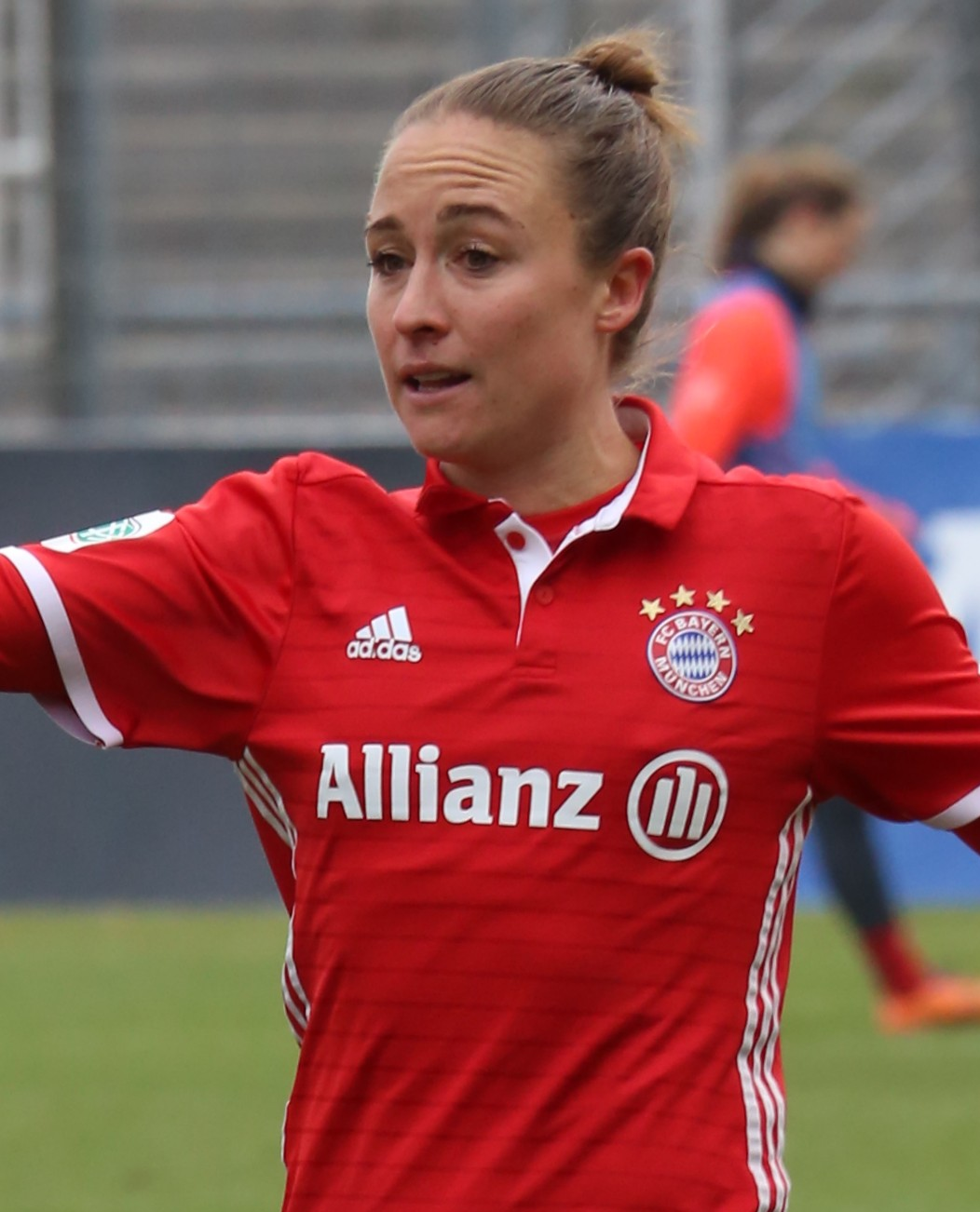 Gina Lewandowski (FC Bayern München) beim Frauen-Bundesliga-Spiel FC Bayern München gegen 1. FFC Frankfurt am 13. November 2016 im Stadion an der Grünwalder Straße, München (Ergebnis war 1:0).